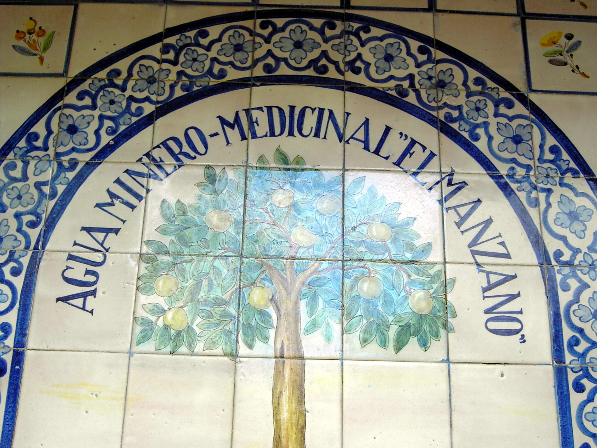 "El Manzano". Antiguo balneario famoso por sus baños de agua minero-medicinal. Actualmente los baños están abandonados y esta destinado para turismo rural. Construido entre 1910 y 1915.